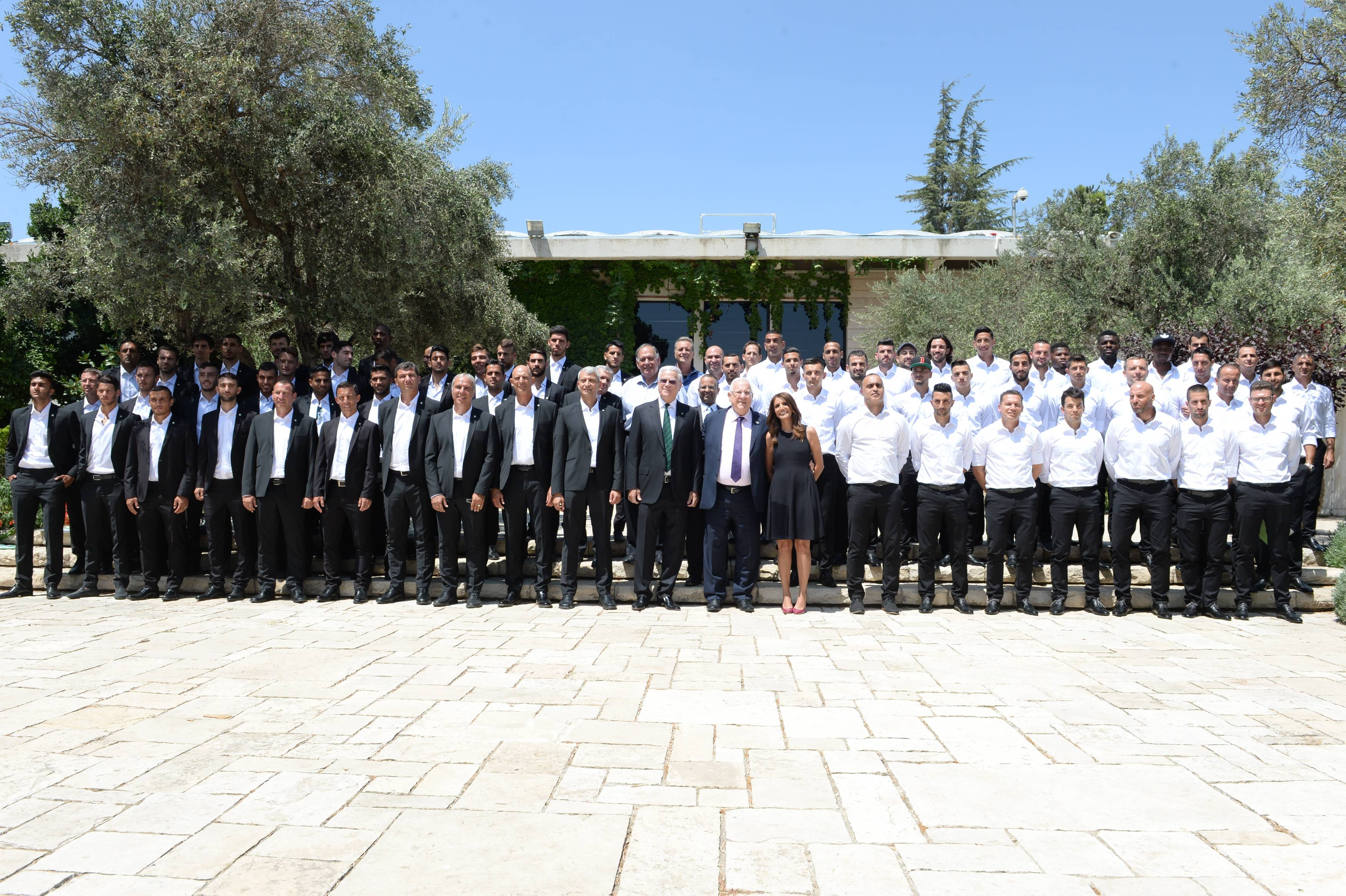 נשיא מדינת ישראל ראובן ריבלין עם שתי הקבוצות המשתתפות במשחק אלוף האלופים, מכבי חיפה והפועל באר שבע.